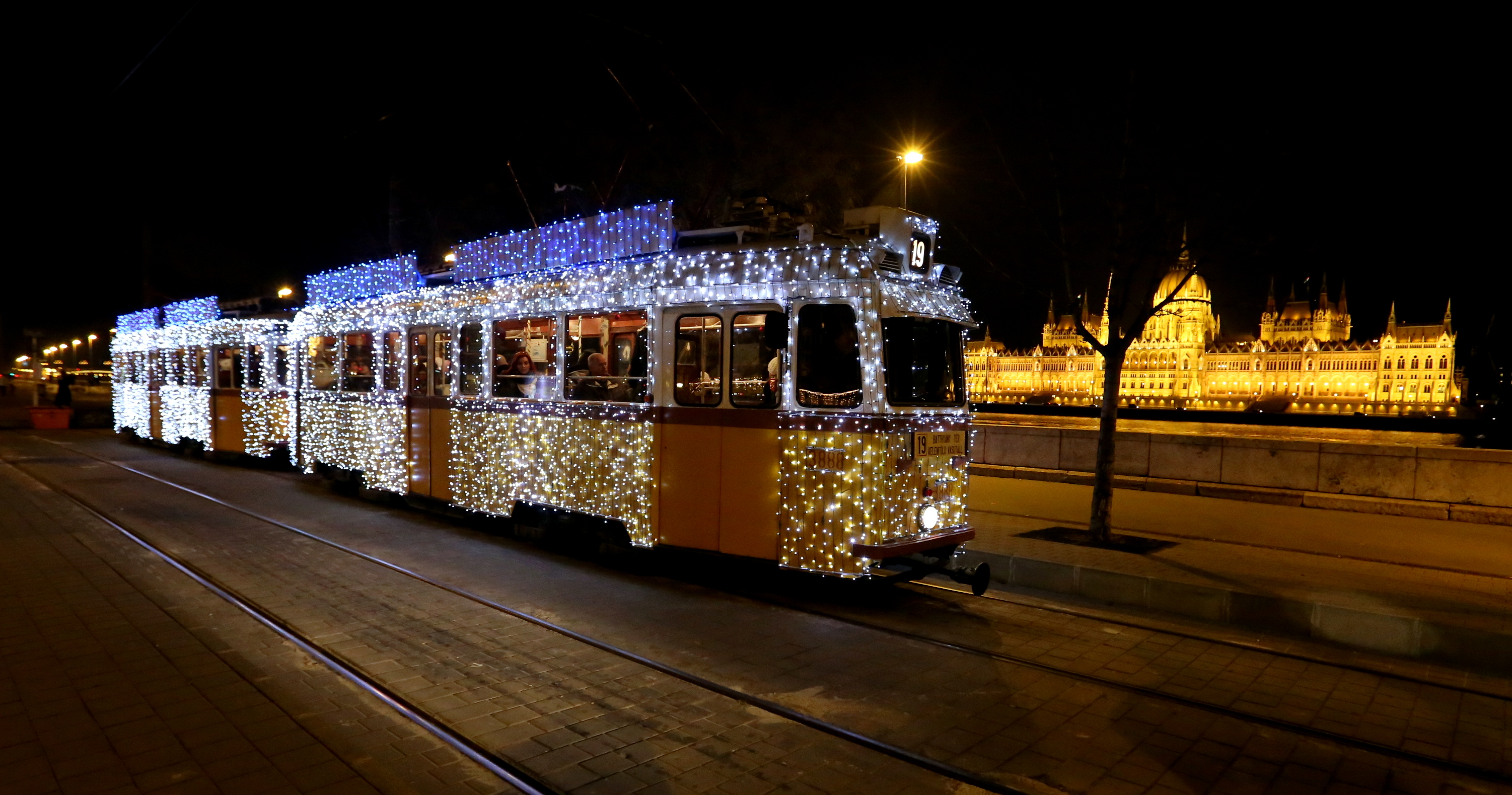 Fényvillamos a Batthyány téren, 2013 decemberben